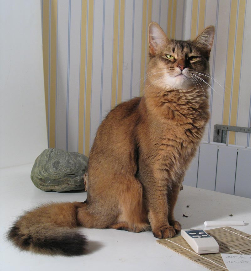 Chat somali femelle âgé de 3 ans (velours de sweety fox)